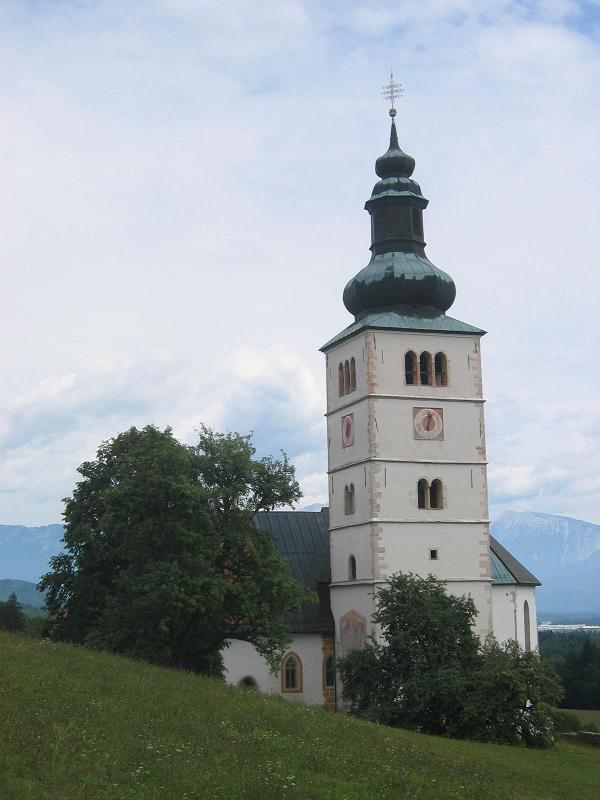 Crngrob pilgrimage church near Kranj, Slovenia. photo:Ziga 08:06, 12 August 2006 (UTC)